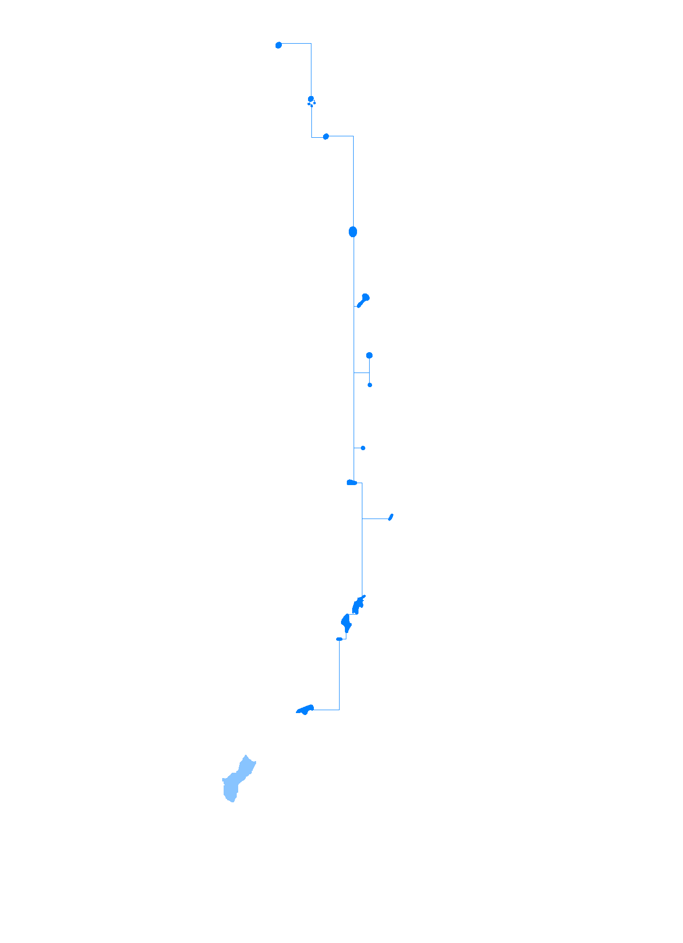 Idioma Chamorro en Guam y las Marianas del Norte